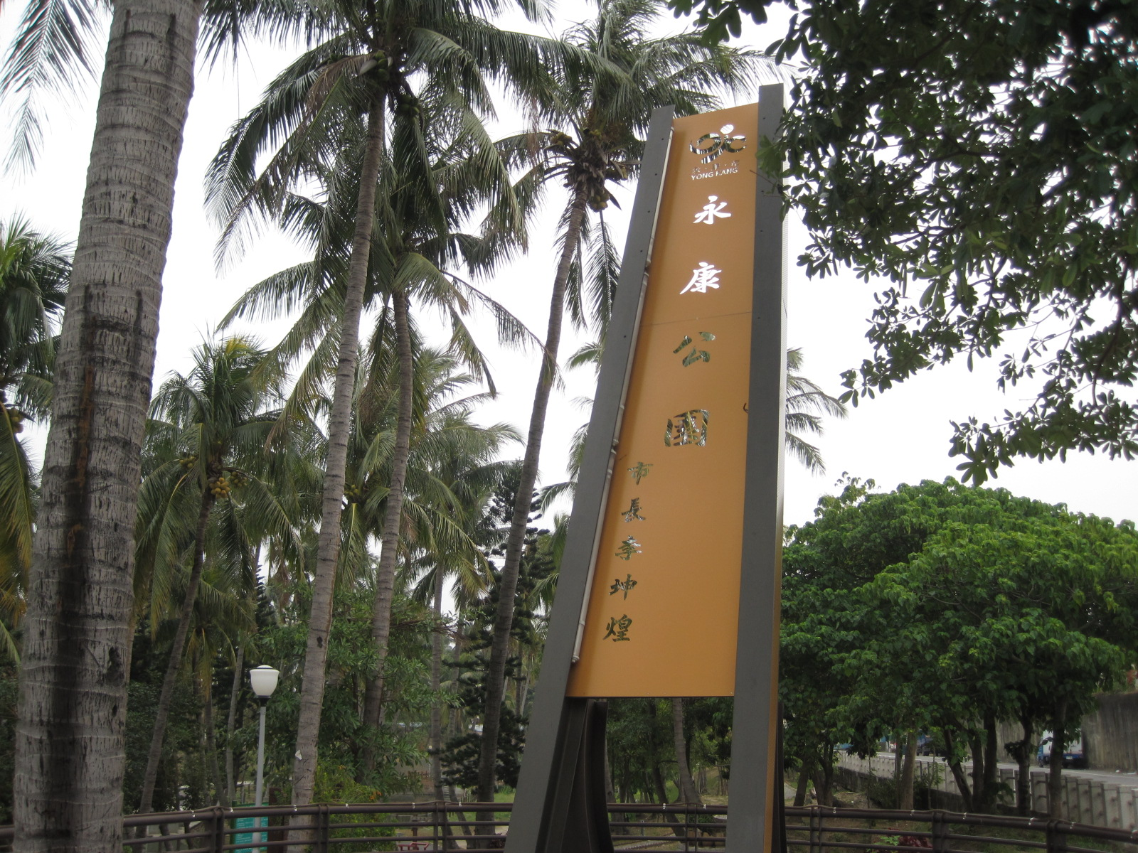 臺南市永康公園標誌牌